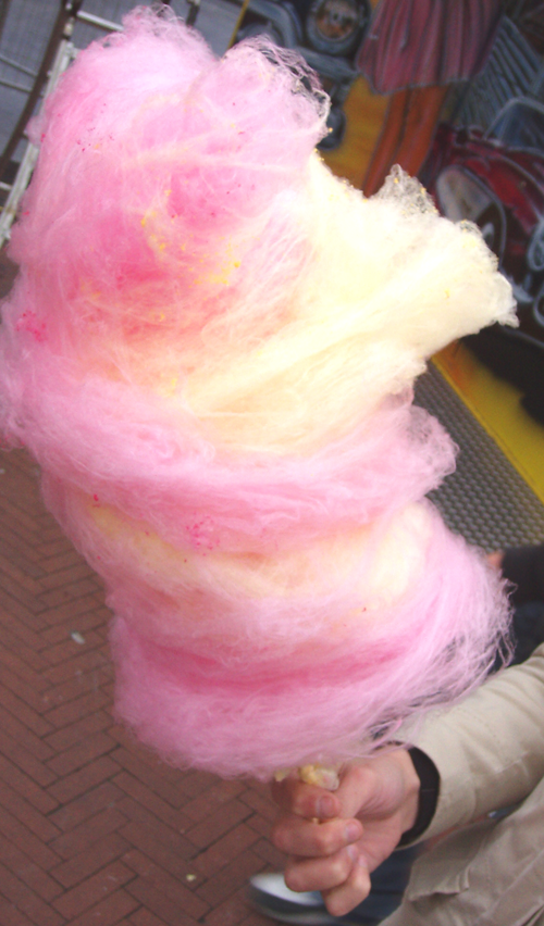 Foto van suikerspin, eigen werk, gemaakt op de kermis van Groningen.